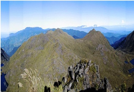 El cerro Chirripó Grande en la parte más alta de de la Cordillera de Talamanca y de Costa Rica es conocido como el Hogar de Sibú el dios Bribri responsable de creación de la humanidad de maíz de colores, todas las razas.